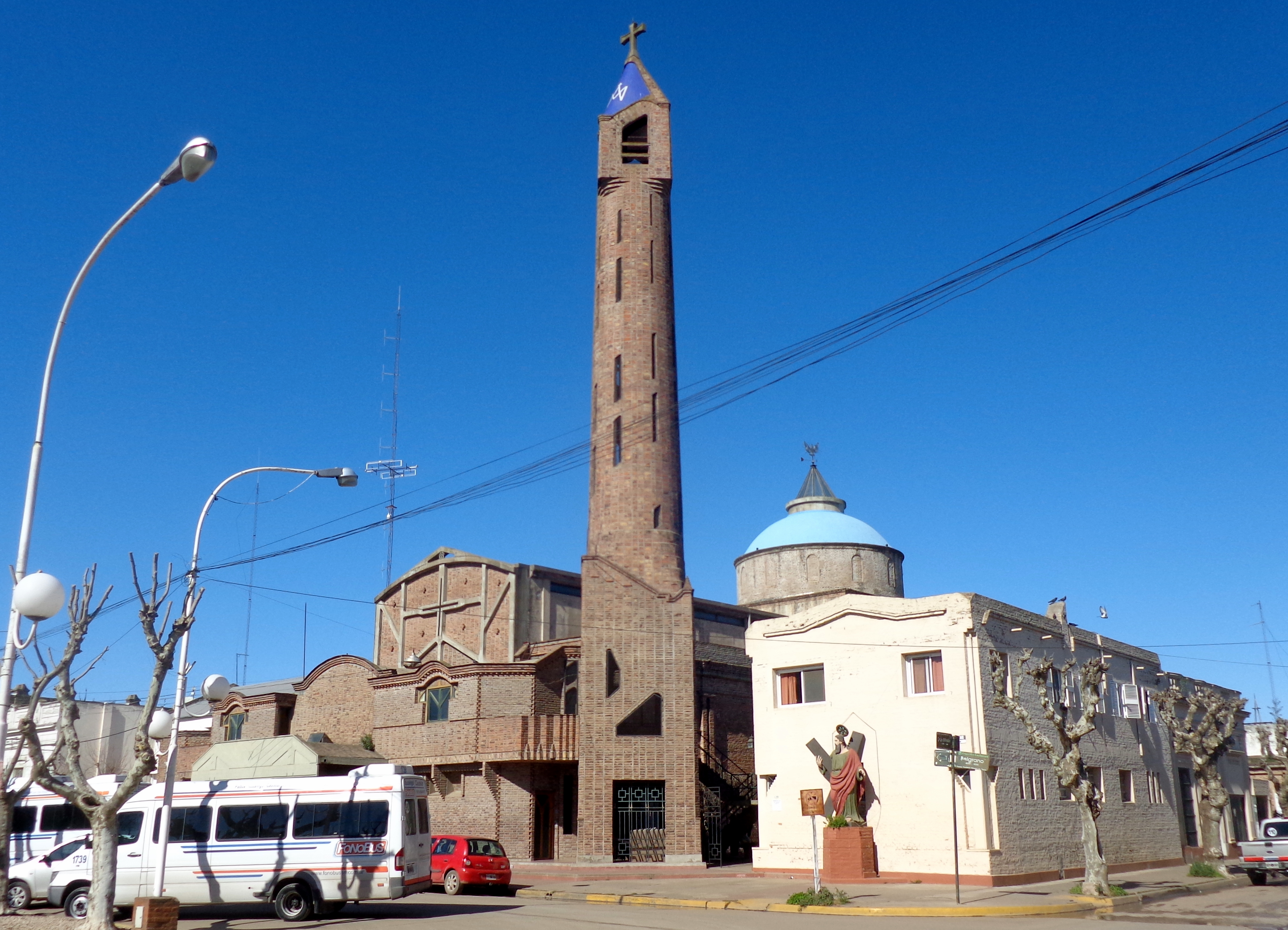 Parroquia San Andres Apostol, Belgrano 319 y San Martín, en San Andrés de Giles, ciudad capital del partido del mismo nombre, provincia de Buenos Aires, Argentina.